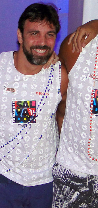 Marcelo Faria